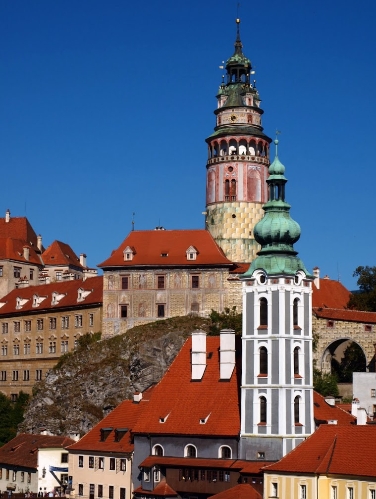 Český Krumlov